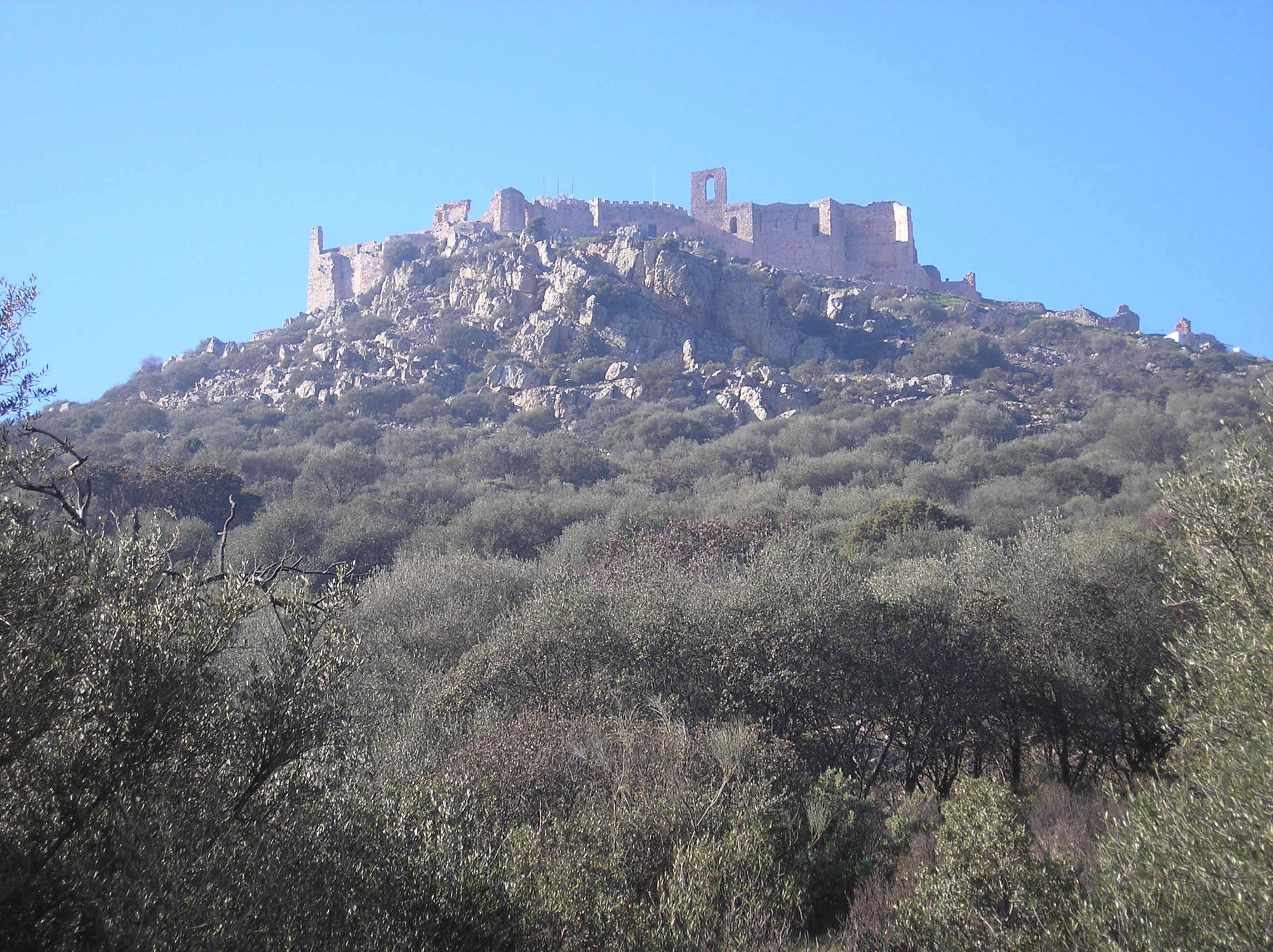 taken by Valdoria. 2006